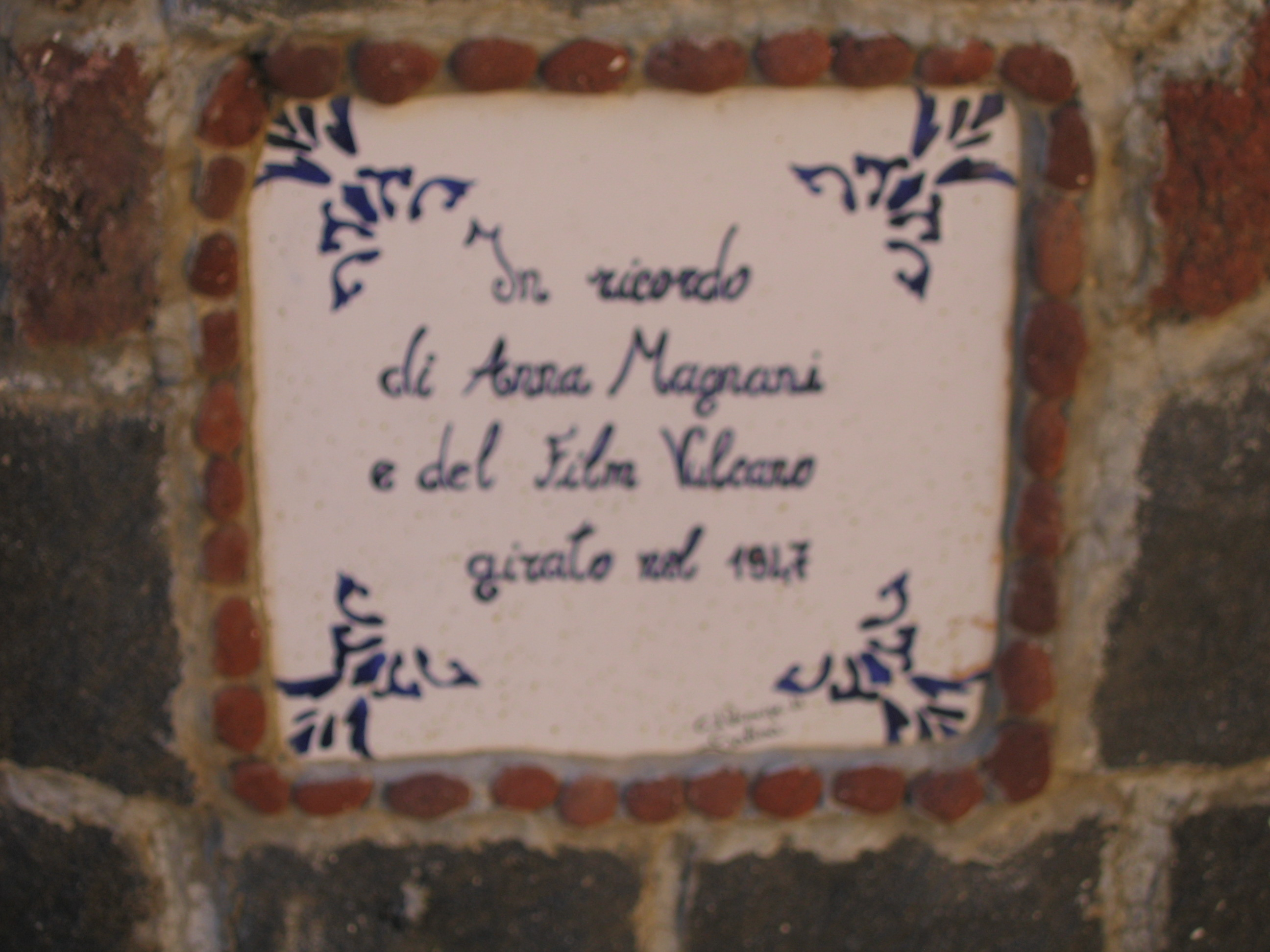 fotografia della targa in ricordo di Anna Magnani, scalinata di Rinella (fraz. di Leni), Isola di Salina (ME)